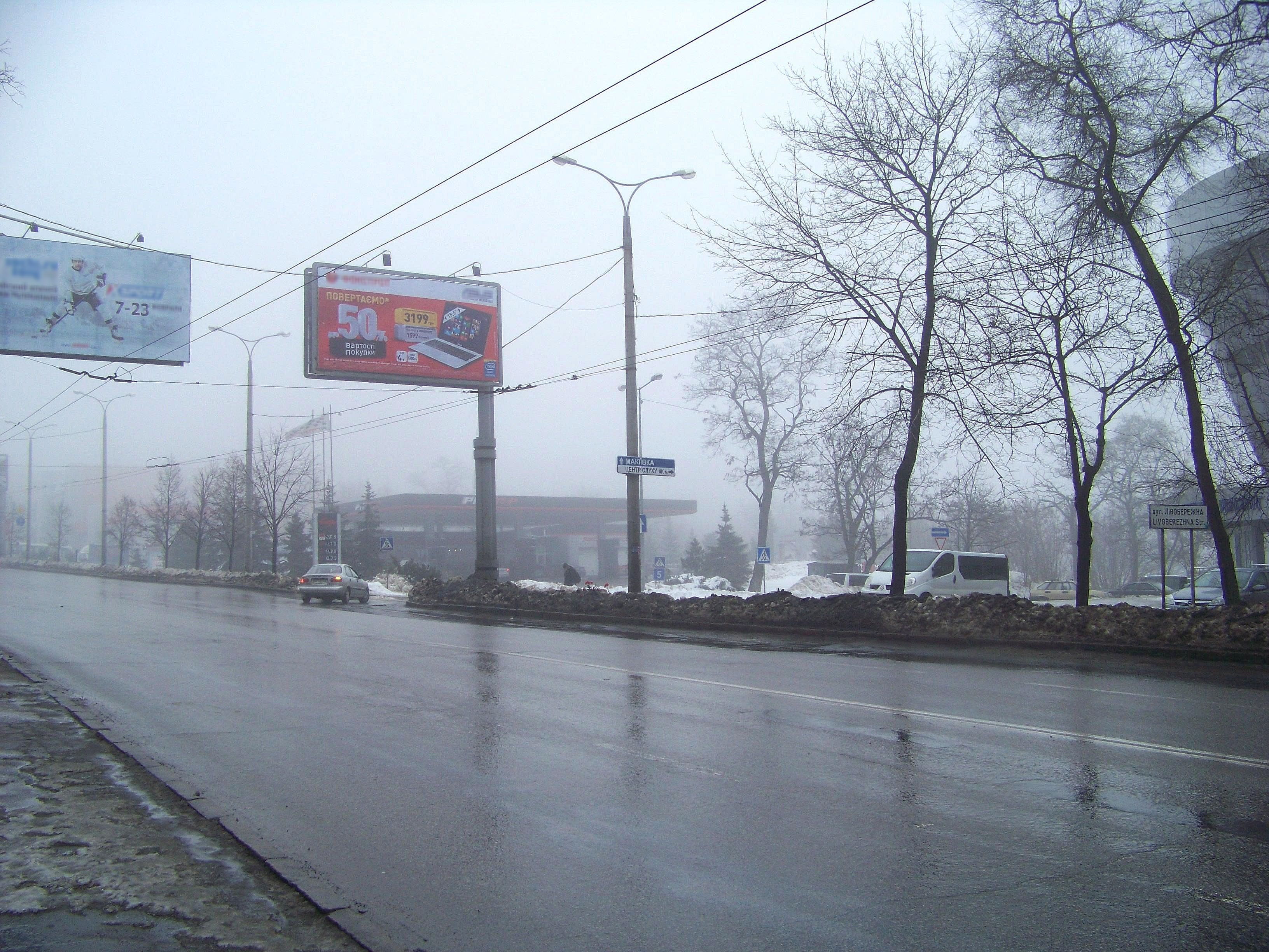 Перехресття на проспекті Ілліча й вулиці Лівобережної 10 лютого 2014 року.